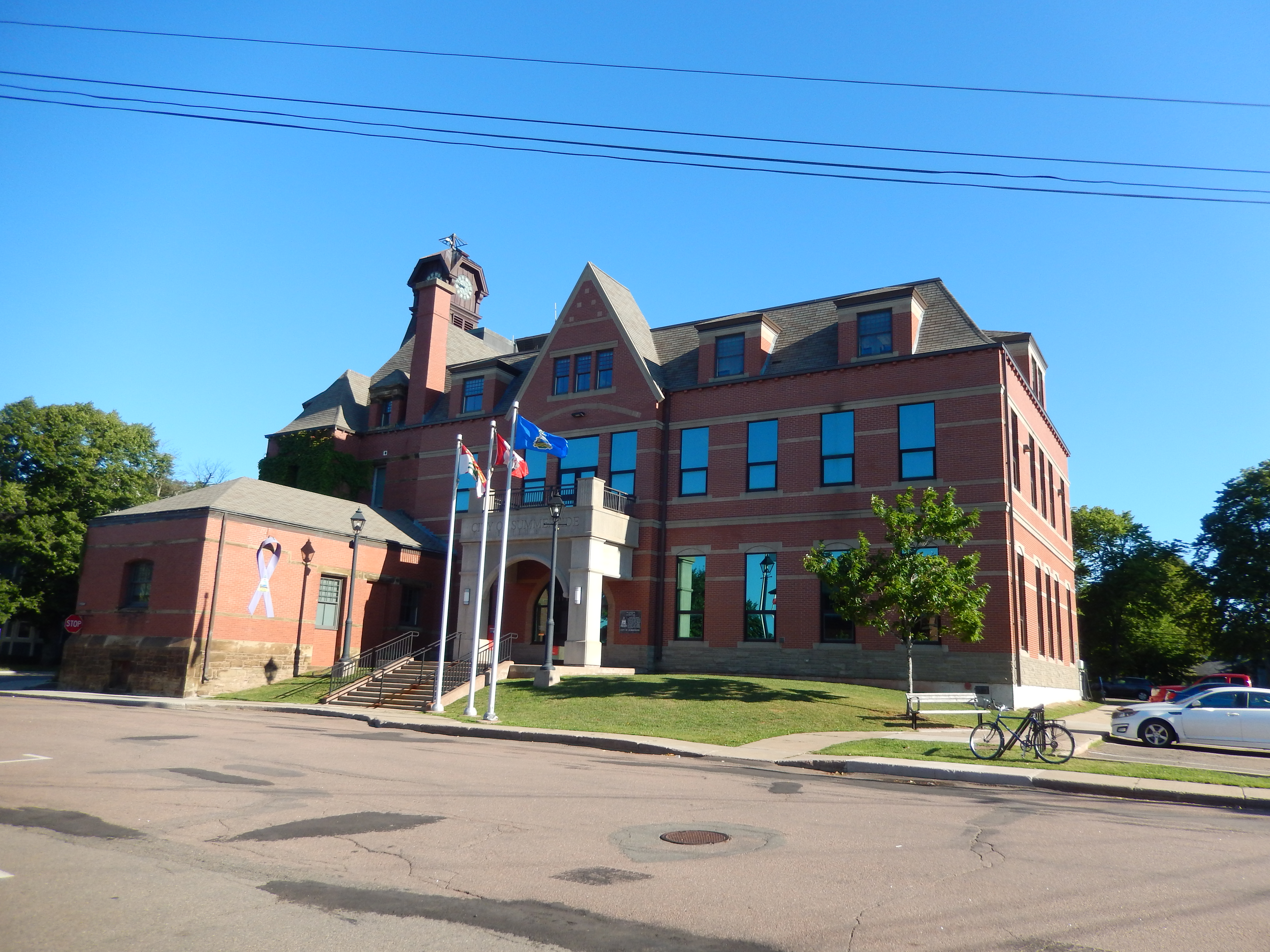 Lieu historique national du Canada de l'Ancien bureau de poste de Summerside, 45 Summer Street, Summerside (Canada). (Protection National Historic Site of Canada. Voir la liste des lieux patrimoniaux de Summerside pour plus de détails).